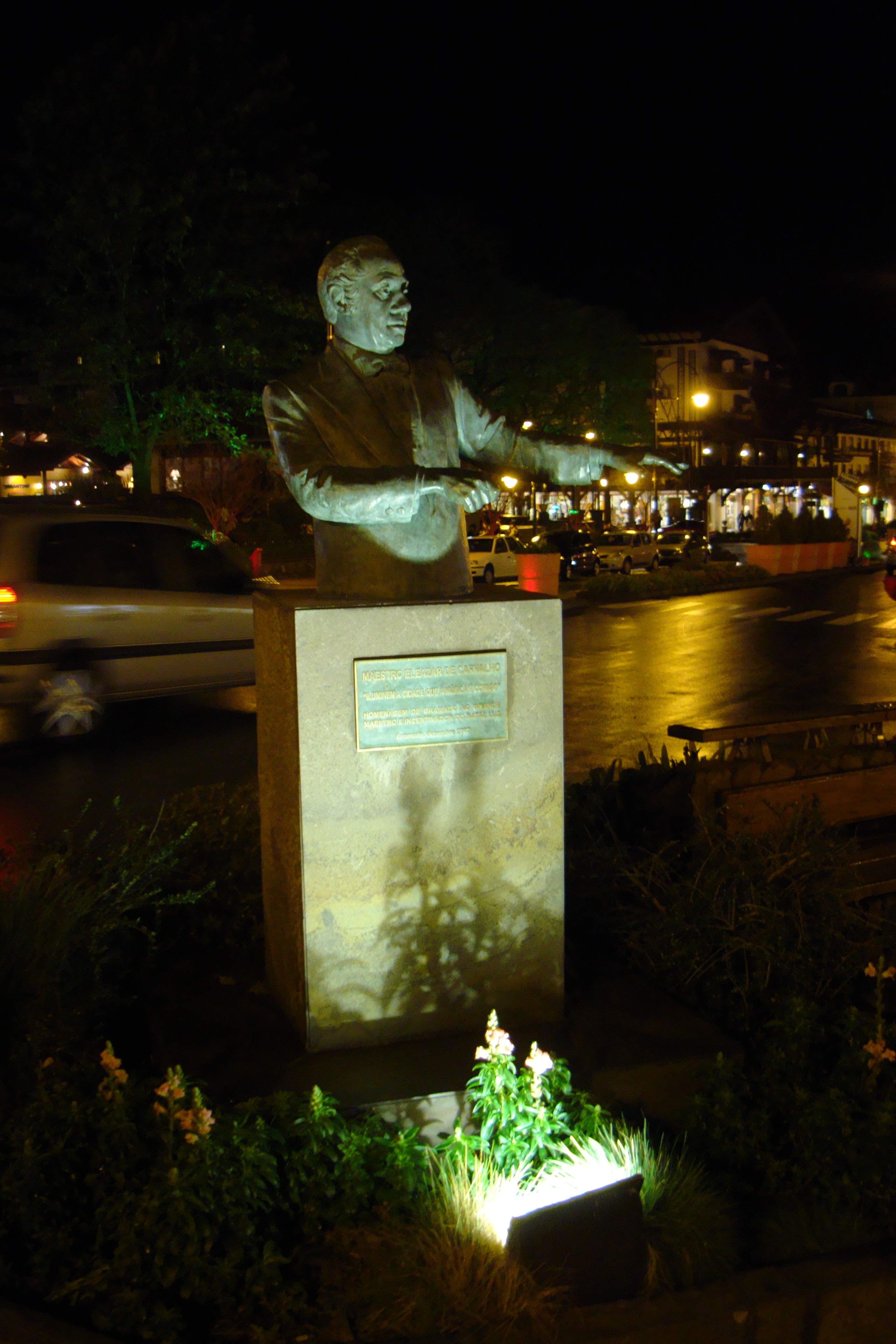 Estátua de Eleazar de Carvalho em Gramado, Rio Grande do Sul, Brasil